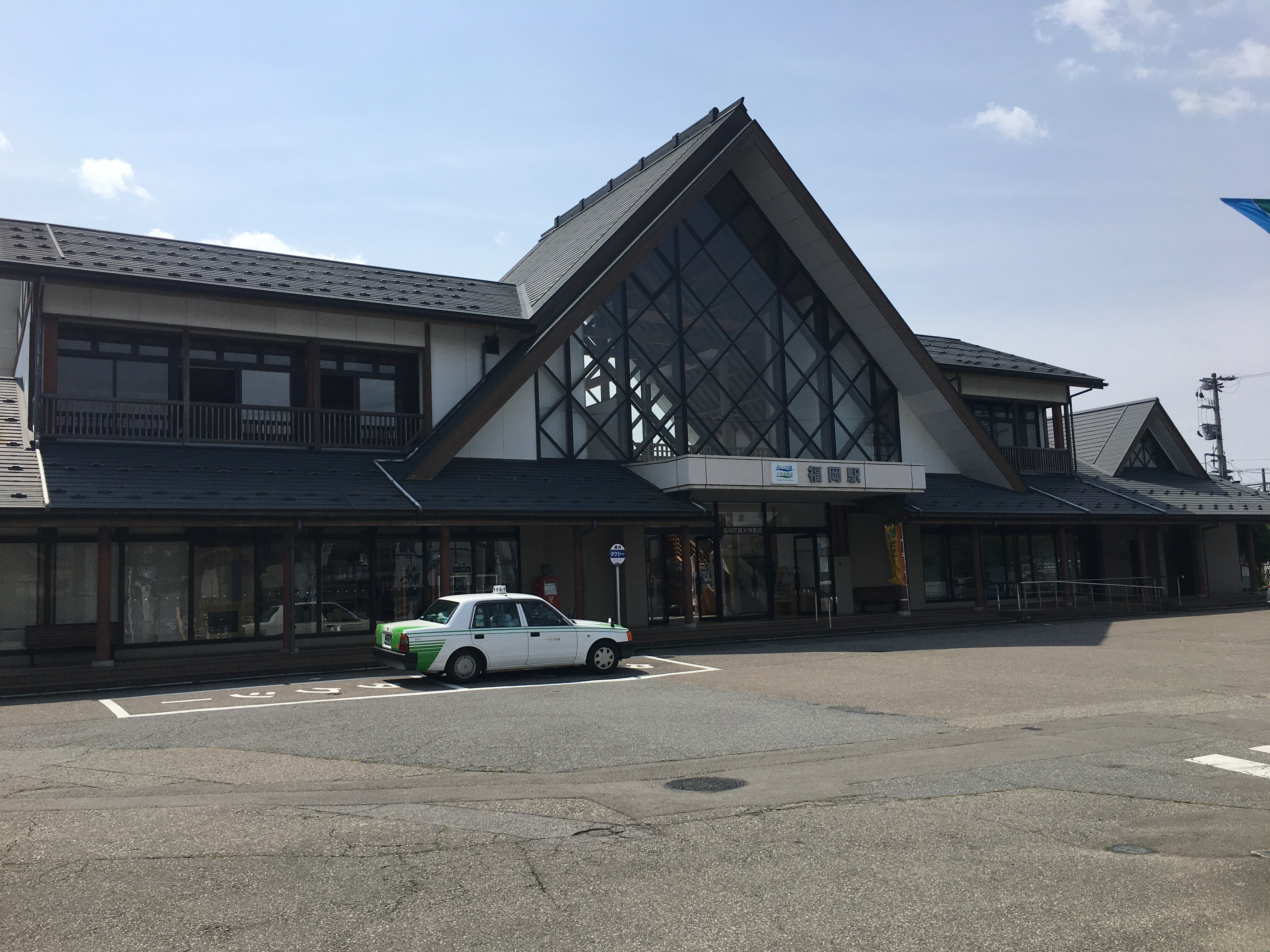 あいの風とやま鉄道福岡駅駅舎